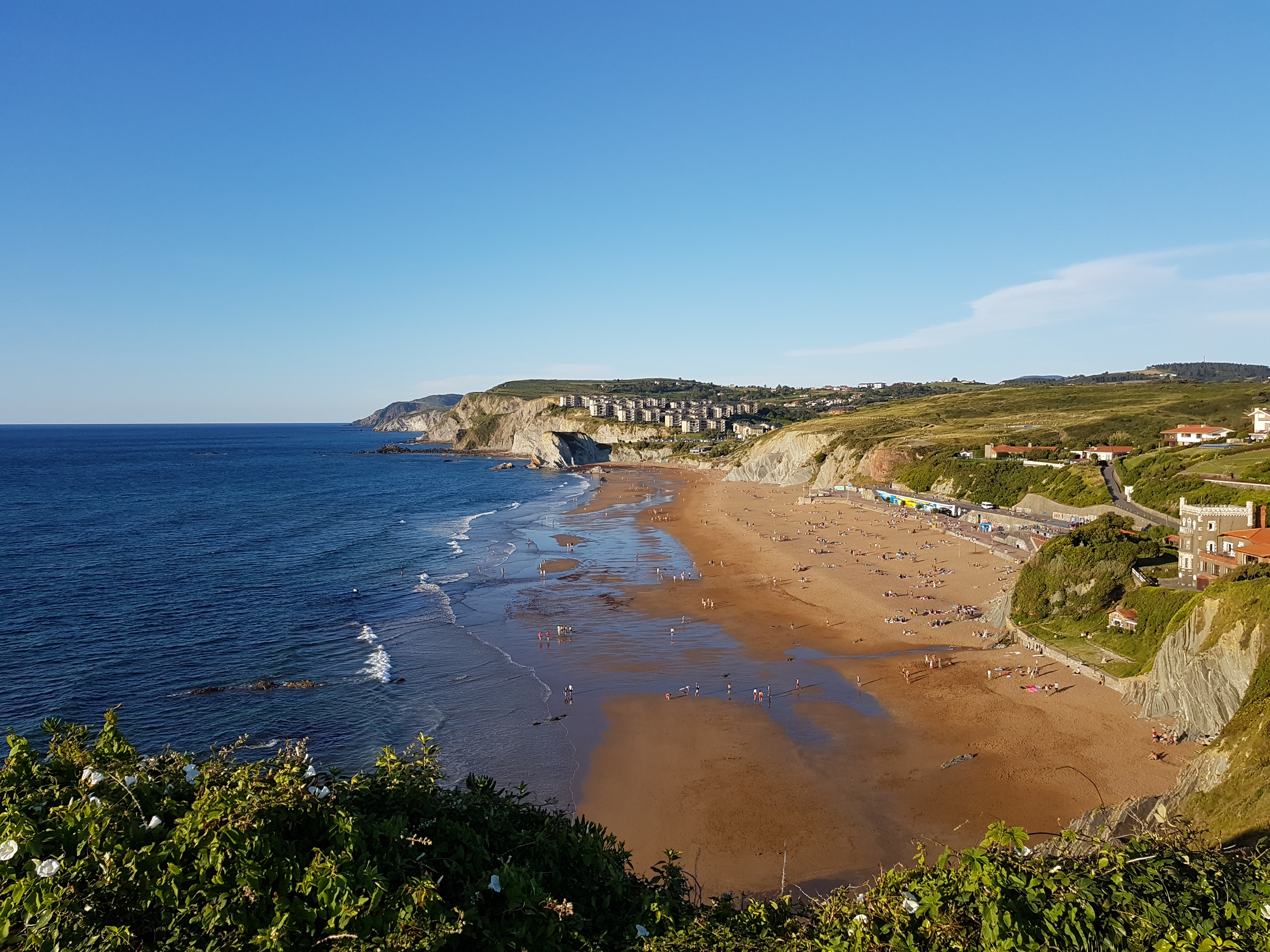 Playa de Arriatera - Atxabiribil.